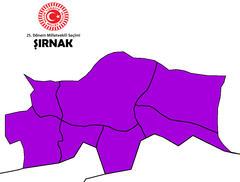 2015 genel seçim sonuçları